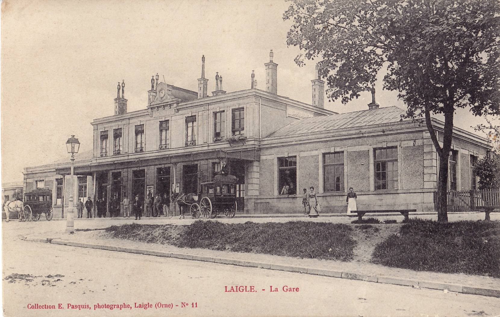 Carte postale ancienne éditée par E. Pasquis, photographe à L'Aigle :LAIGLE - La Gare